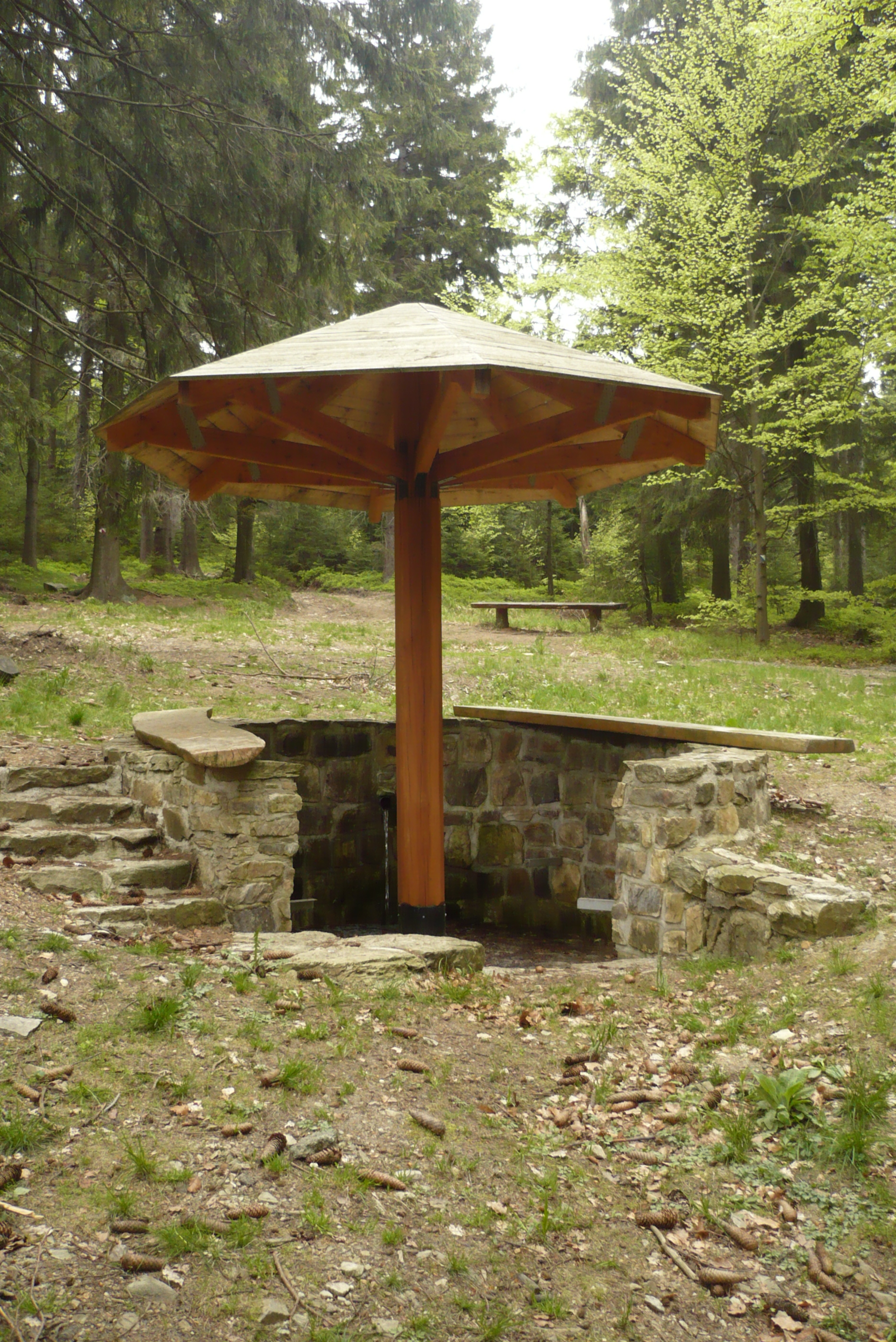 Źródło